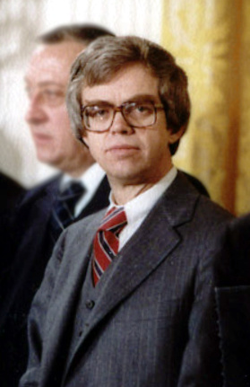 Martin Anderson